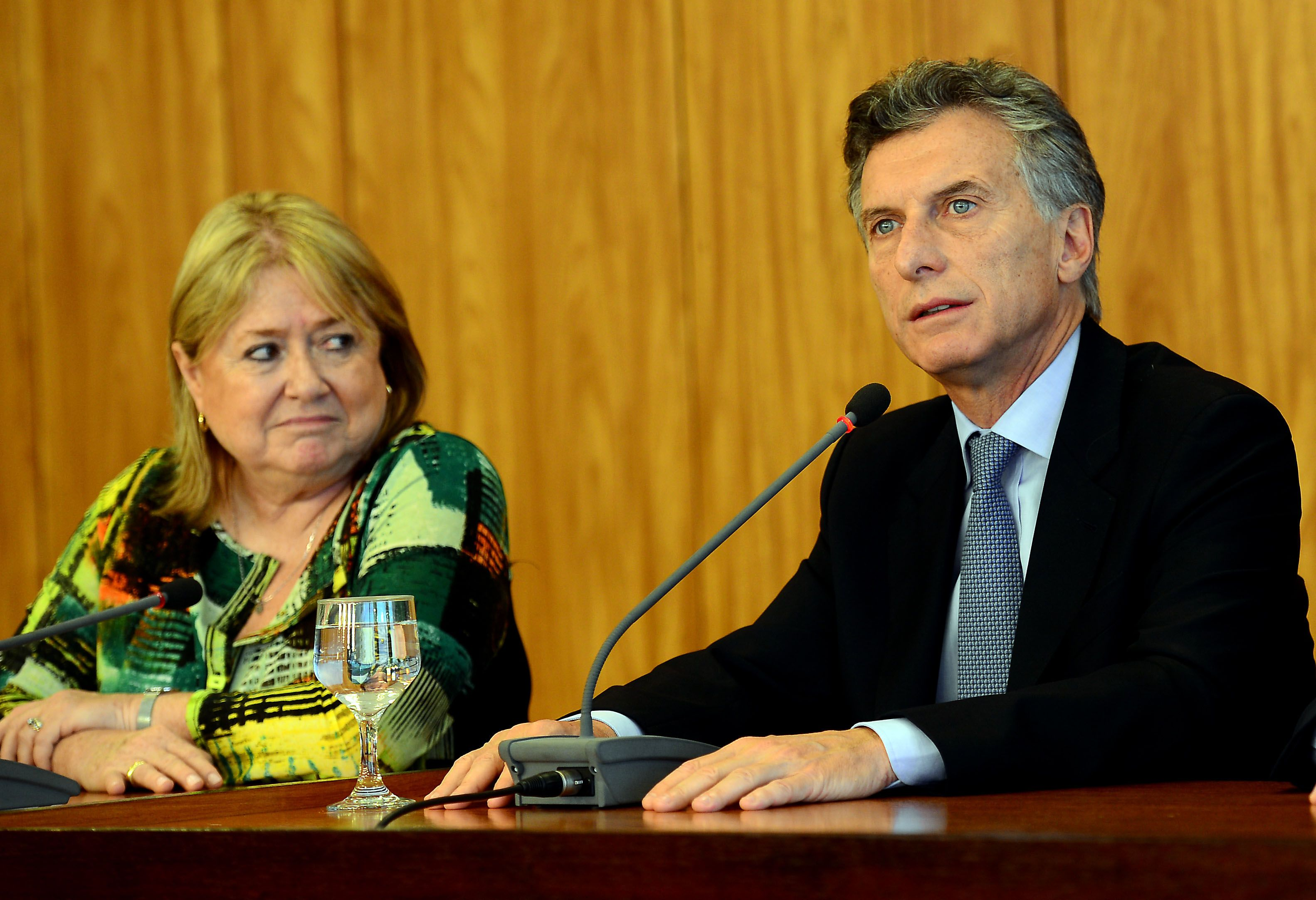 Brasília - Entrevista coletiva do presidente eleito da Argentina, Mauricio Macri, ao lado da futura chanceler, Susana Malcorra no Palácio do Planalto.